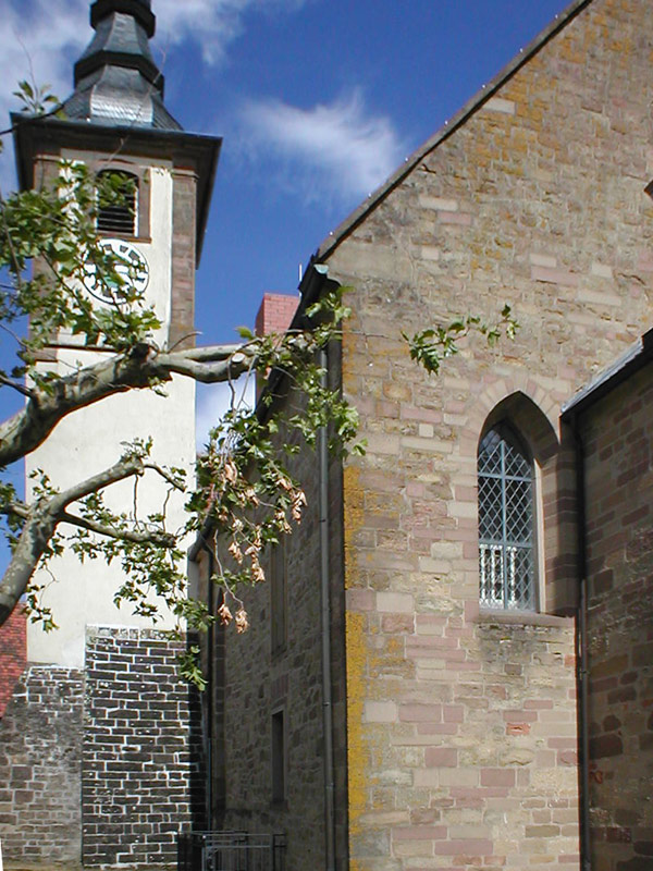 Evang. Michaelskirche in Sinsheim-Hilsbach, Simultankirche 1705-1951